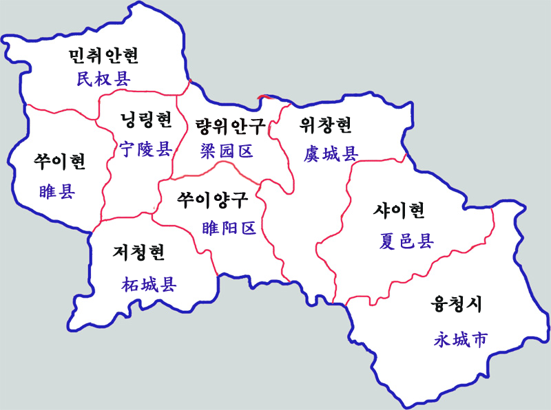 상추시 현급구역도